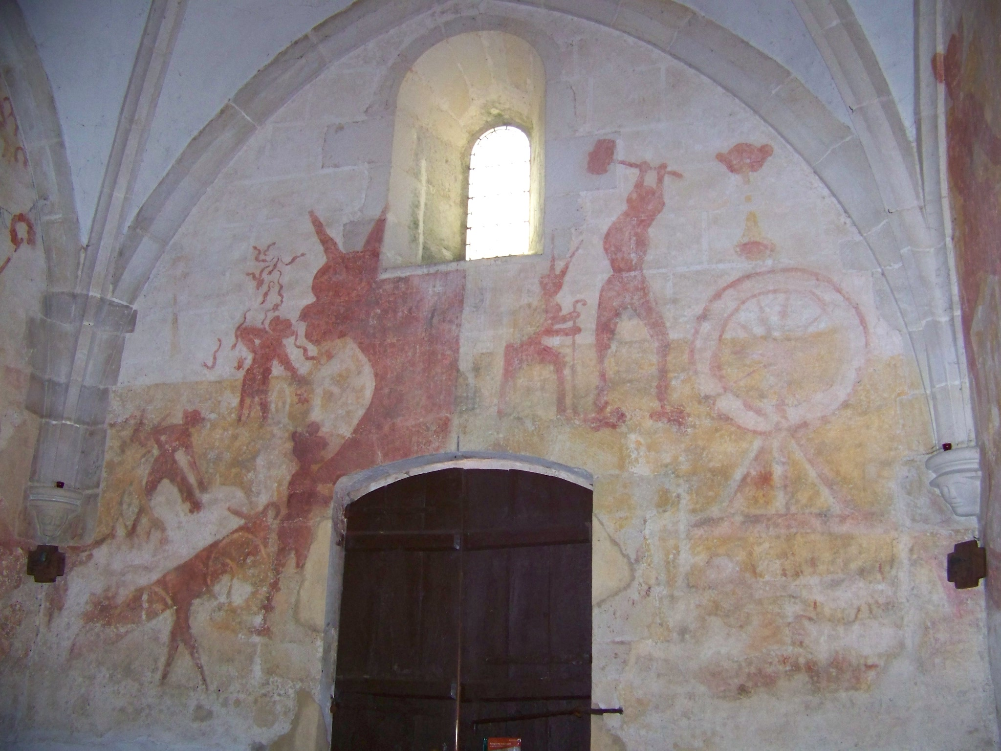 Fresque du XVe siècle, église Saint-Martin de Champniers. Revers de la façade.